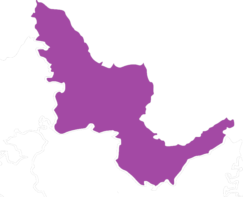 Región Papaloapan, una de las ocho regiones que conforman al estado mexicano de Oaxaca.